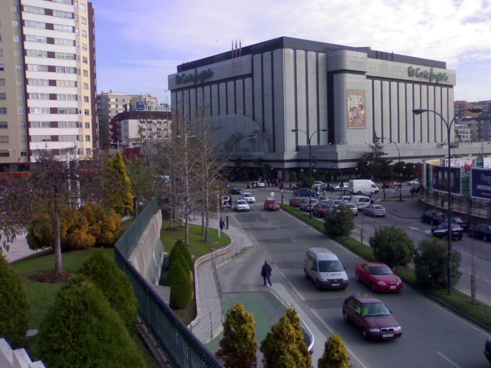 A Coruña, desde Plaza del Tebeo, El Corte Ingles Una foto tomada desde el pequeño parque junto a la Plaza del Tebeo desde la que se puede ver el Corte Inglés y el centro comercial Cuatro Caminos. A la derecha se ve la esquina de la estación de autobuses, y la avenida Enrique Salgado Torres. Foto tomada a finales del 2007.